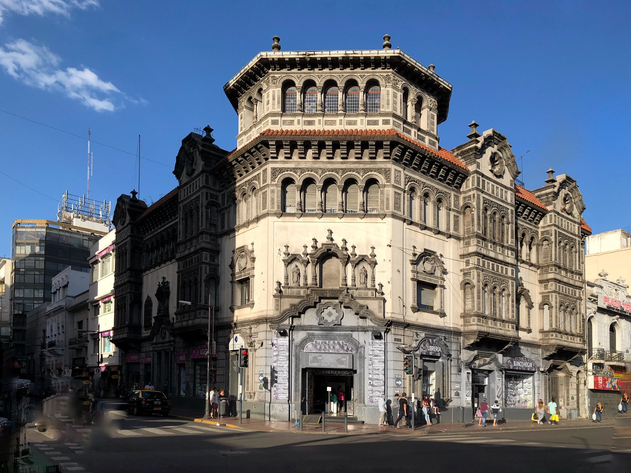 Foto de Casa Fracassi, exterior. Rosario, Prov. de Santa Fe, Argentina.